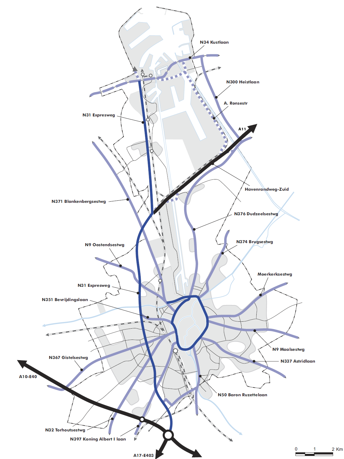 Schema van wegen en spoorwegen in Brugge